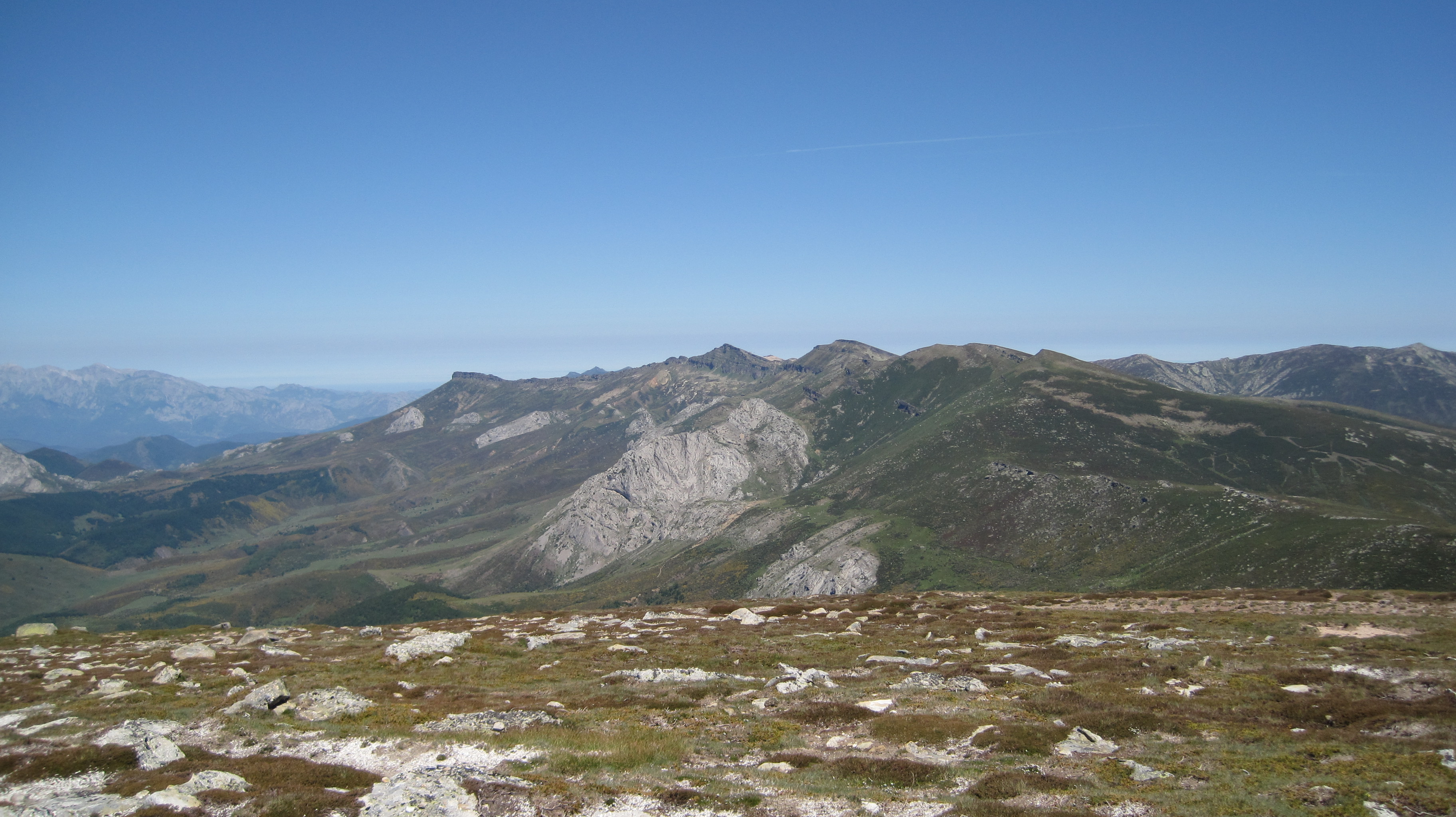 Vista general de la sierra de Peña Labra desde el pico Valdecebollas (Palencia, España).